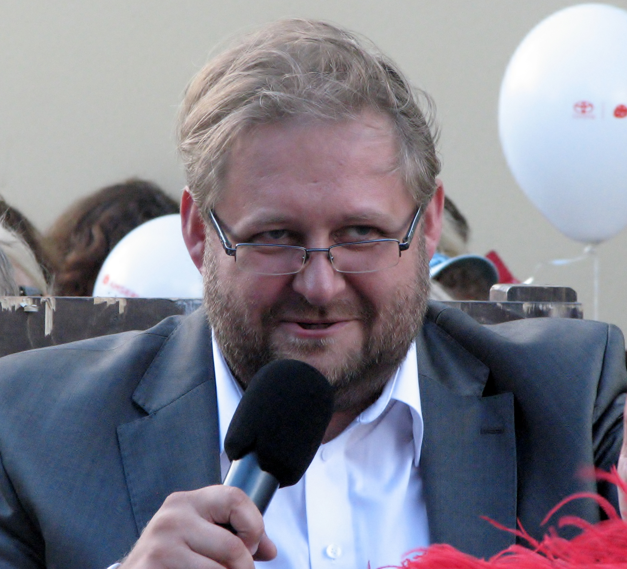 Anvar Samost Postimehe peatoimetajana allkirjastamas koostöölepingut Rahvusooper Estonia peadirektor Aivar Mäega Estonia 107. hooaja avamisel